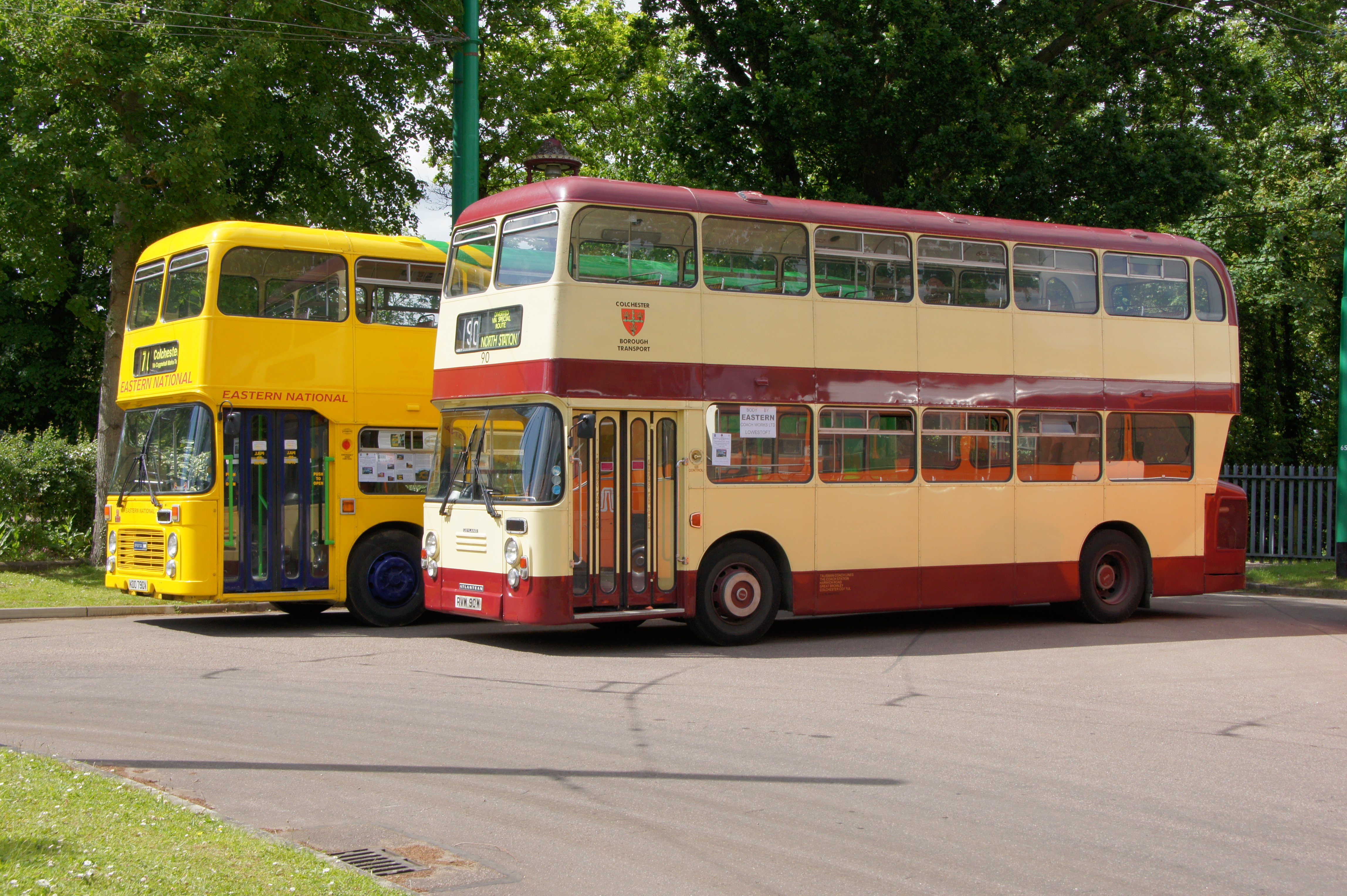 KOO790V-RVW90W 170612 CPS